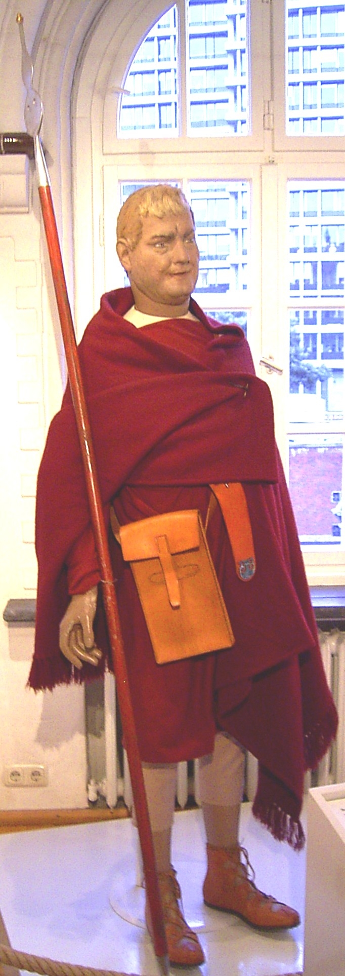 Rekonstruktion der Uniform eines römischen Benficarius im deutschen Zollmuseum Hamburg. Der B. war oft ein als Zollwache eingesetzter römischer Soldat im Unteroffiziersrang. Er beaufsichitgte in den Provinzen die einheimischen Wachen und Zolleinnehmer. Neben der Erhebung von Wege- und Einfuhrzöllen übernahm er auch polizeiliche Funktion in seinem Abschnitt wahr. Zeichen seines Amtes ist die spezielle Lanze.